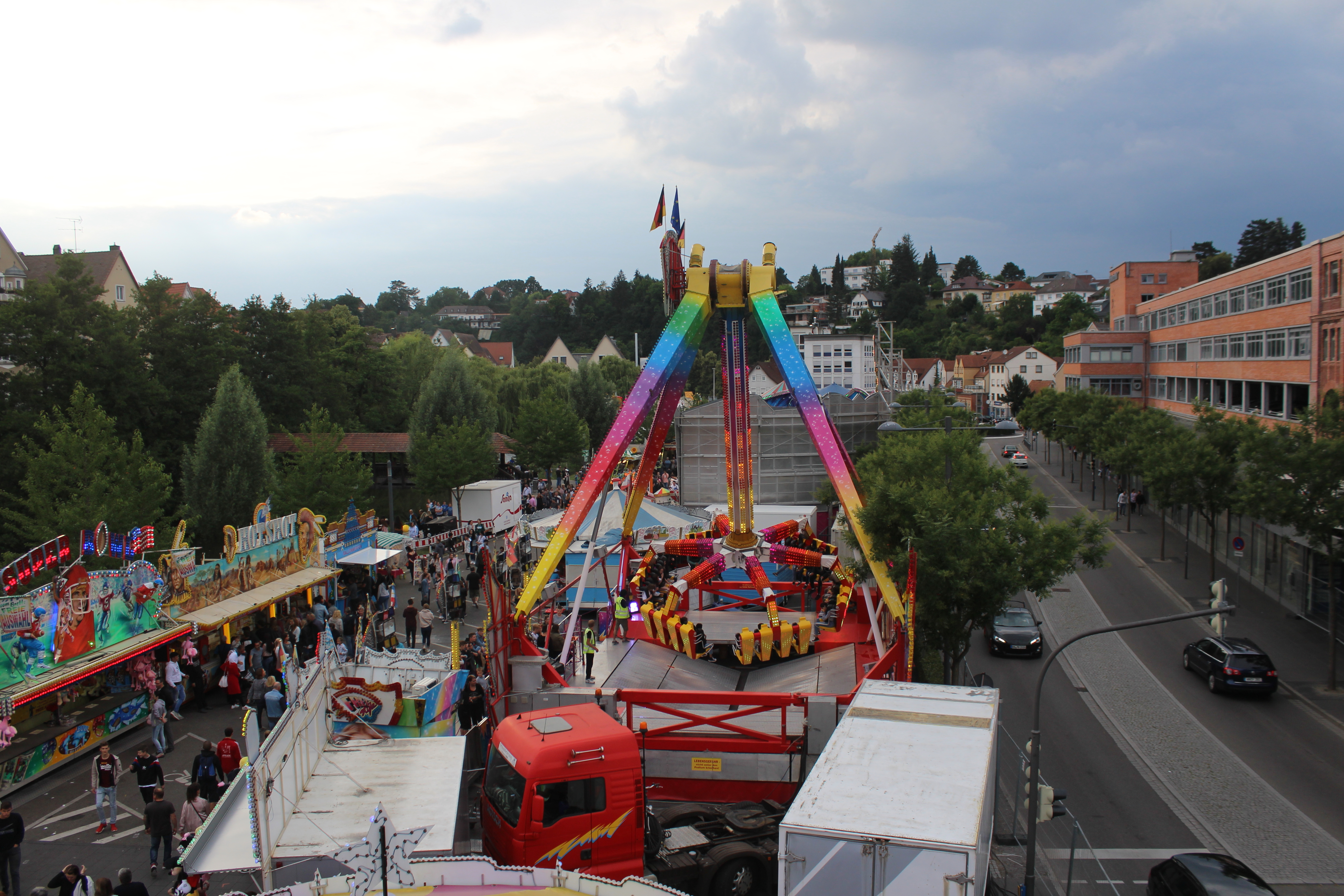 Strassenfest Backnang, fotografiert vom Riesenrad